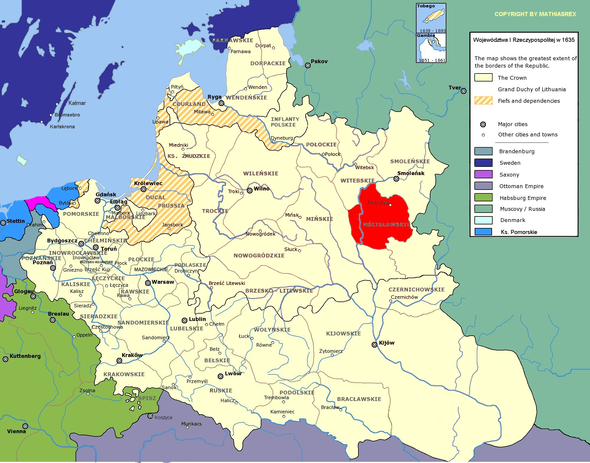 województwo mścisławskie I Rzeczypospolitej A modified copy of Image:Rzeczpospolita voivodships.png by Halibutt